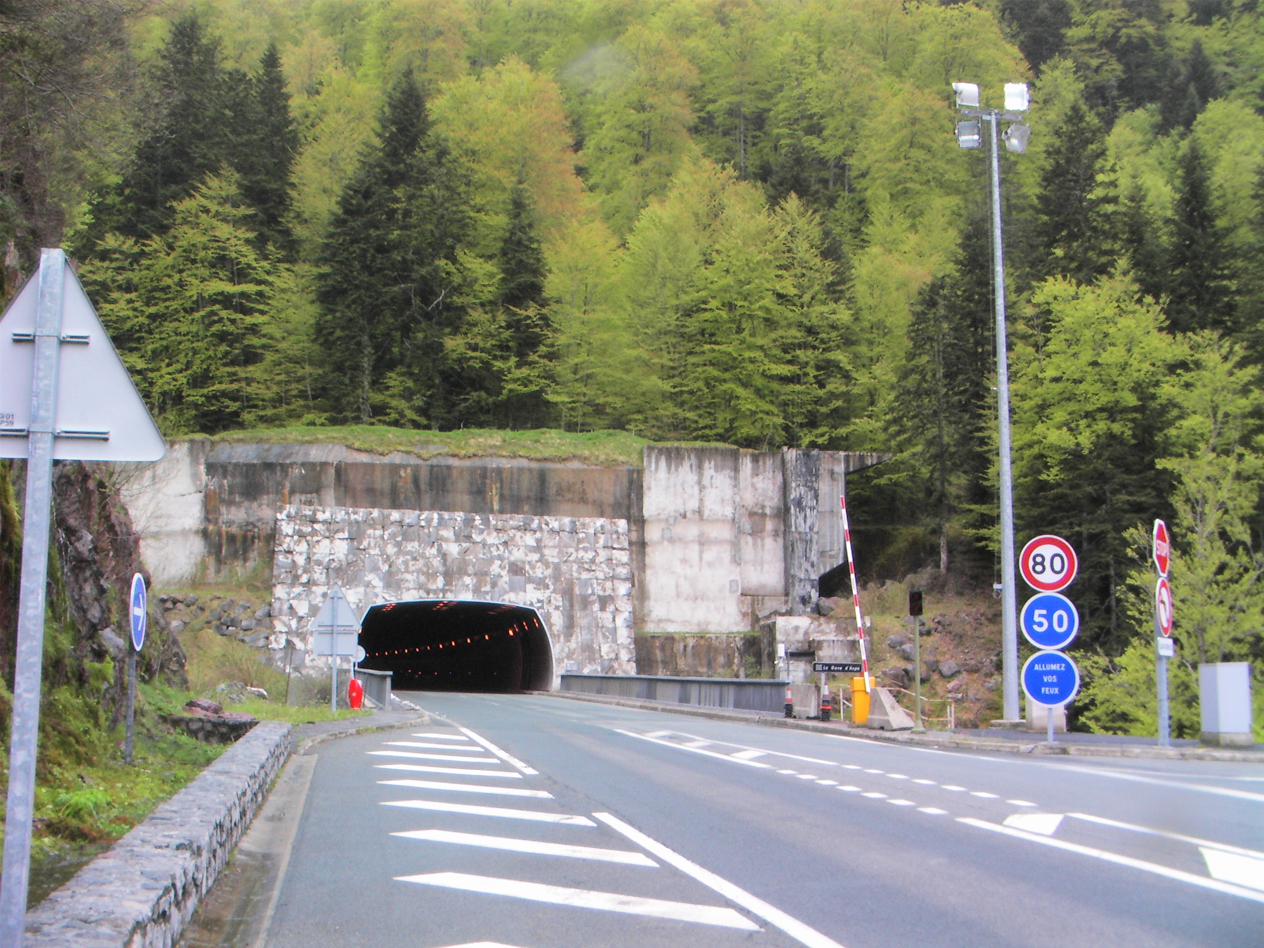 Tunnel du Somport le 16 mai 2010 depuis le côté français.